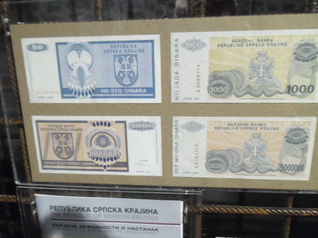 dinar tzv. Republike Srpske Krajine, Muzej Oluje na kninskoj tvrđavi